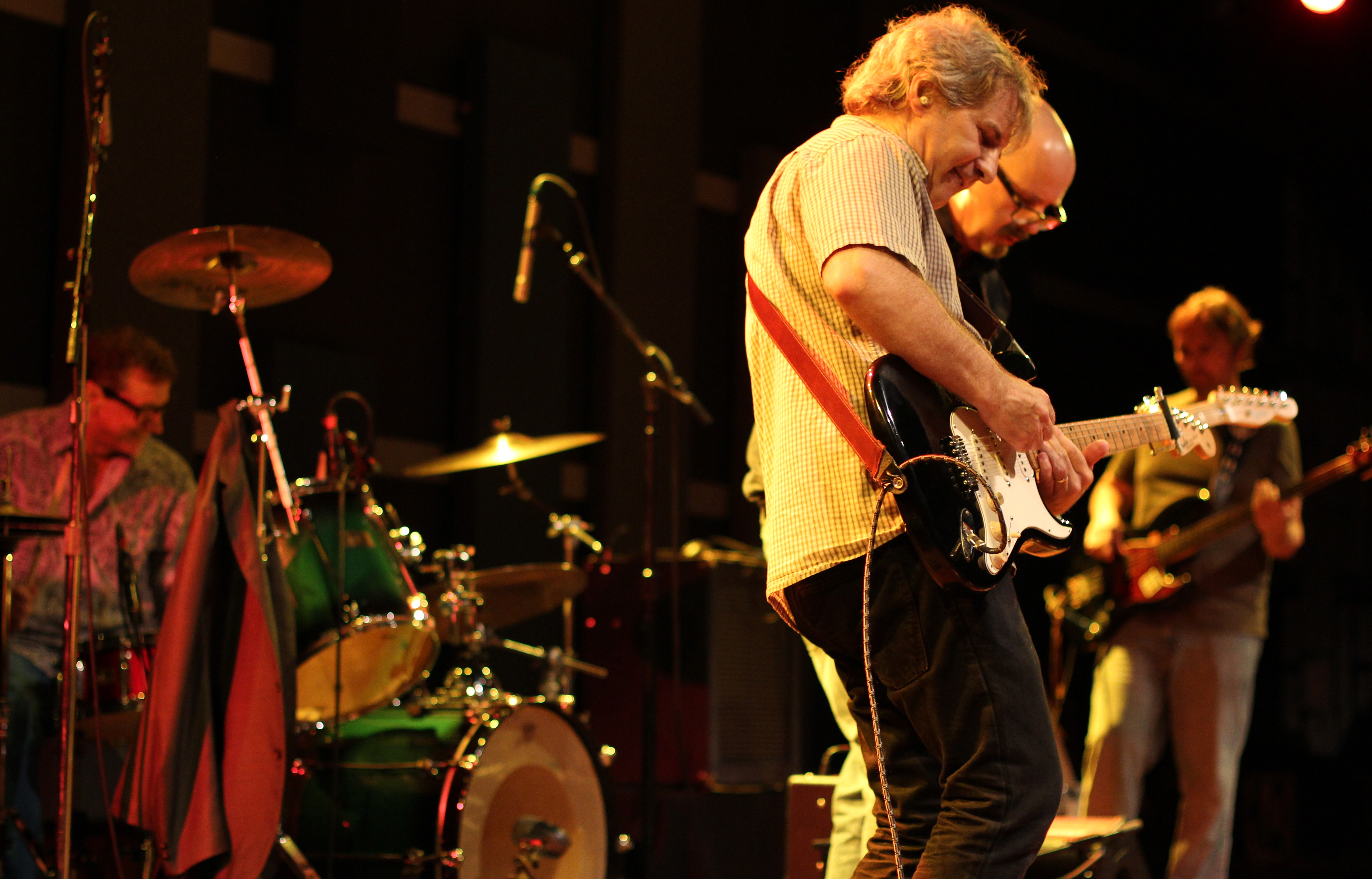 I The dB's in concerto a Filadelfia il 31-8-2012